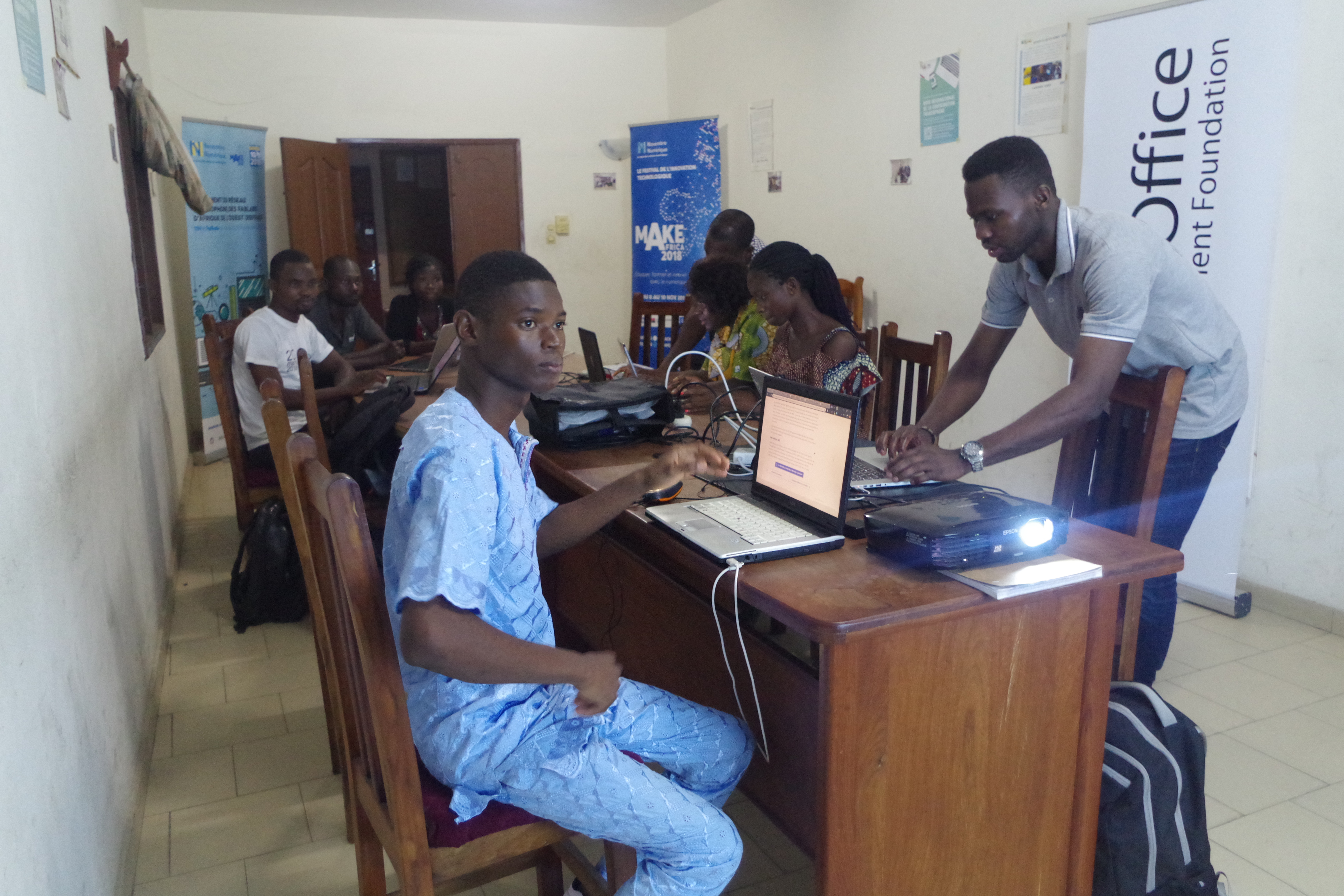 Vue d'ensemble de la salle de formation du Blolabau cours de l'Atelier Mois de la contribution francophone 2019